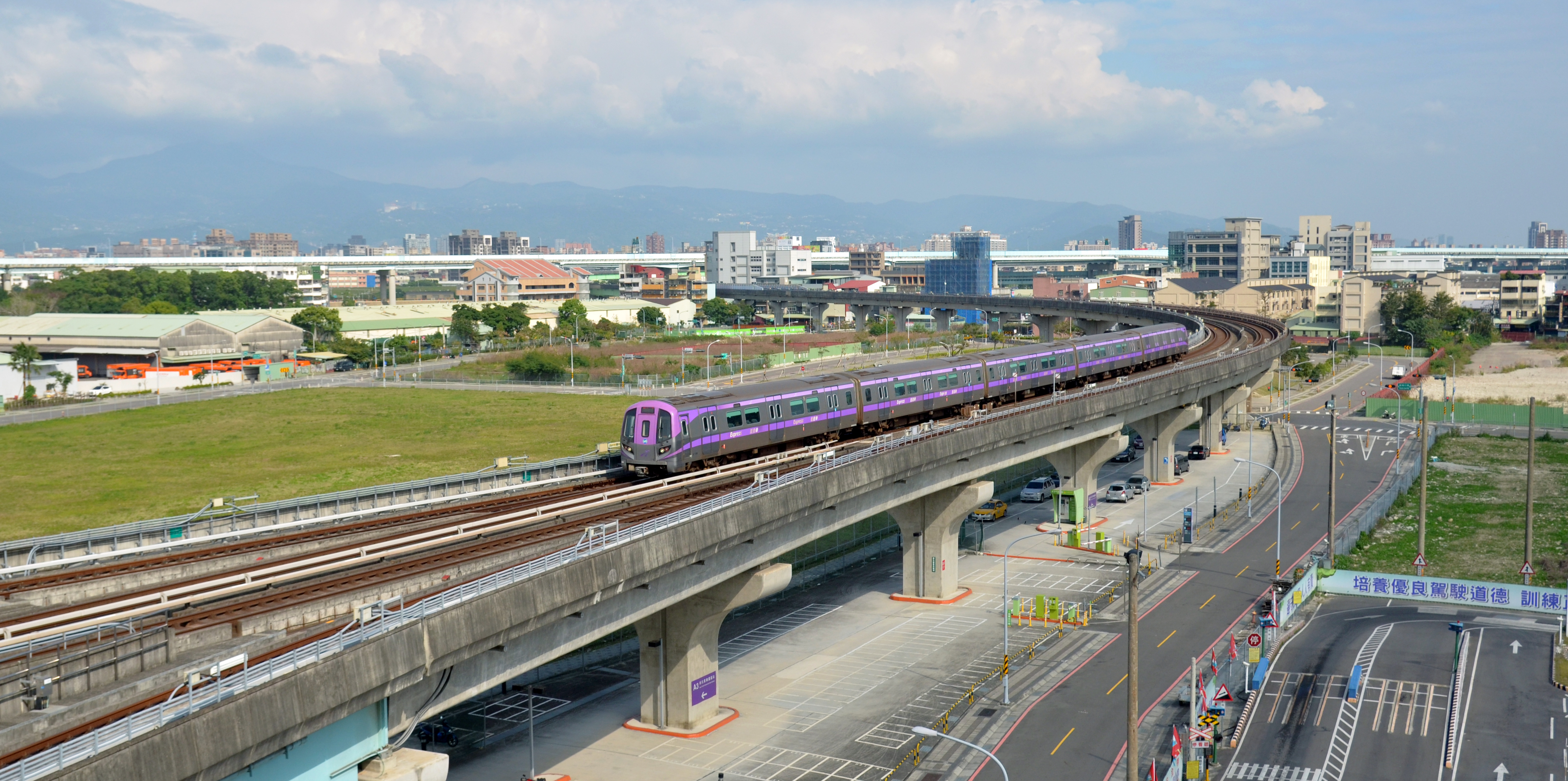 中文（台灣）: 桃園捷運直達車即將抵達新北產業園區站。